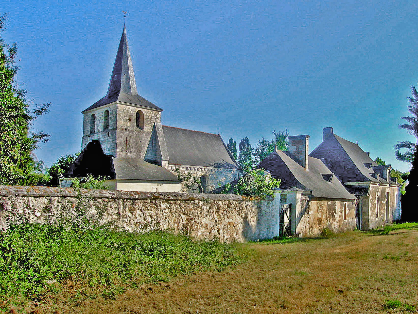 Presbytère de Chartrené, 18ème siècle.